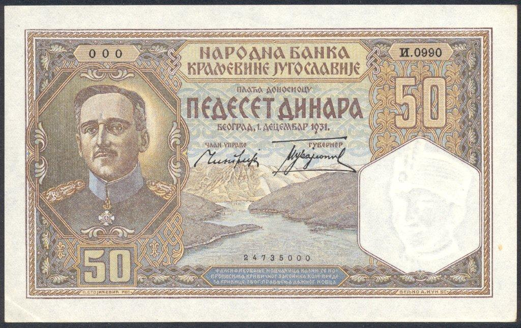 50 Yugoslav dinars note (1929 dinar)